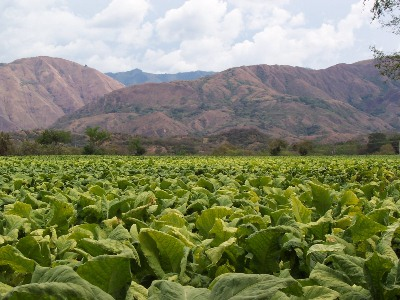 Culture de tabac, montagne sèche, Région de Huila